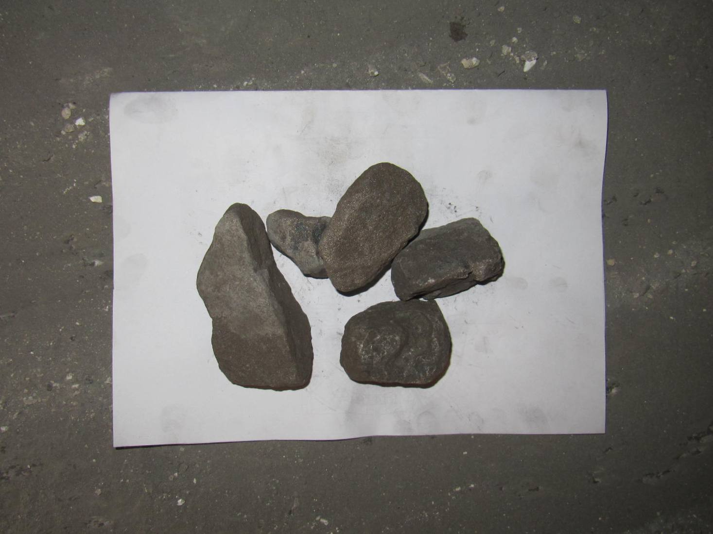 Echantillons de ferromanganèse carburé, utilisés en sidérurgie (posés sur feuille A4)